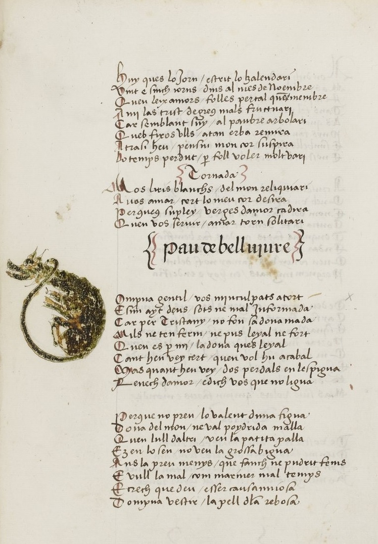 Dompna gentil, vos m'enculpats a tort poem